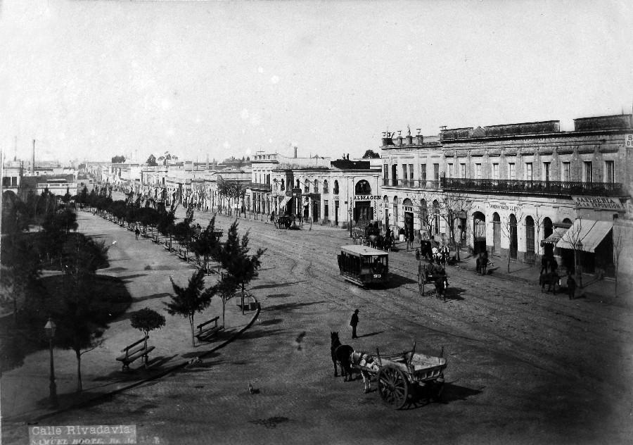 Avenida Rivadavia vista desde la calle Ecuador hacia el este, con la Plaza de Miserere o Plaza Once de Septiembre a la izquierda. fines del siglo XIX.